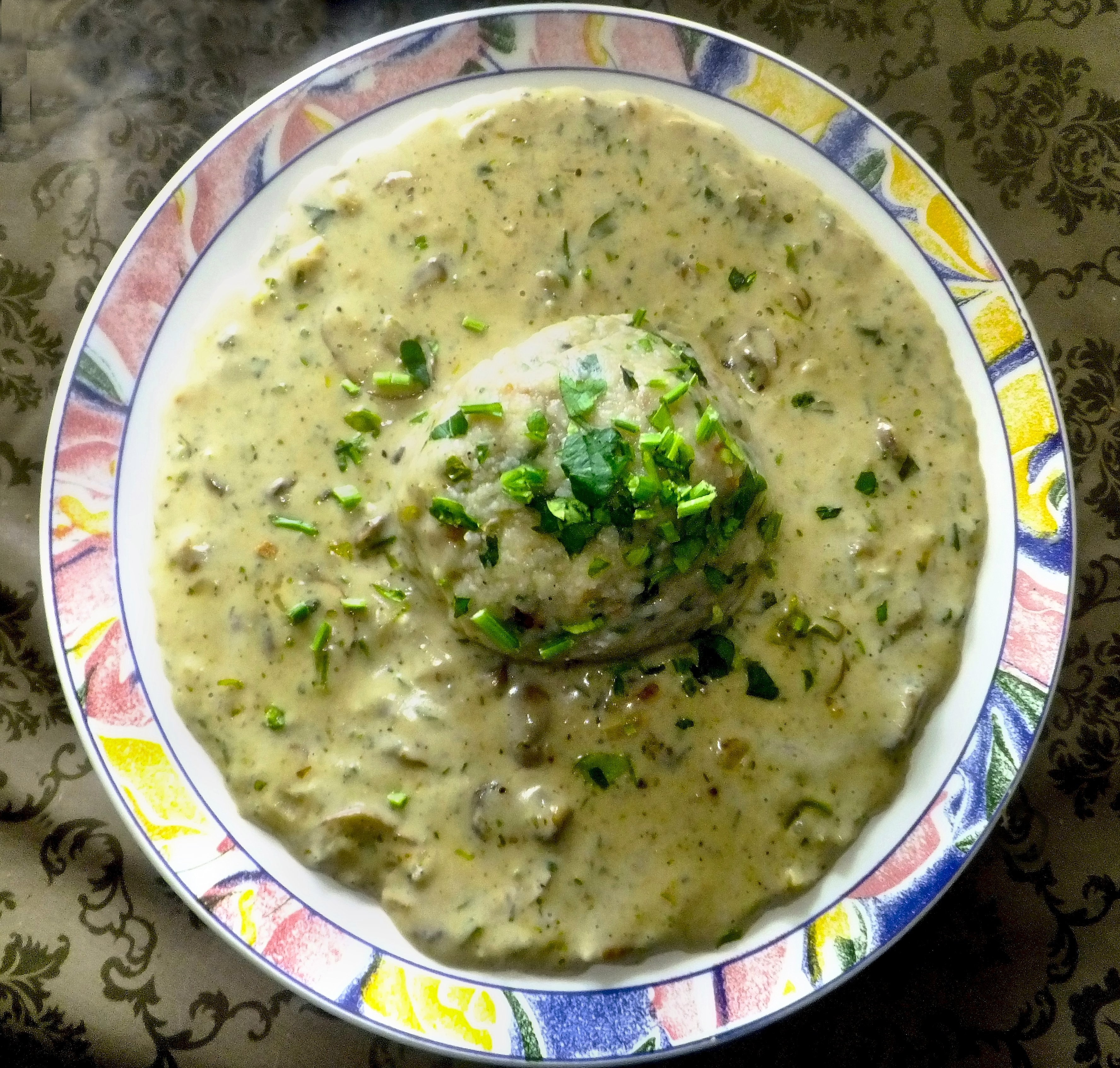 Pilzgemüsemit Wiesenchampignons